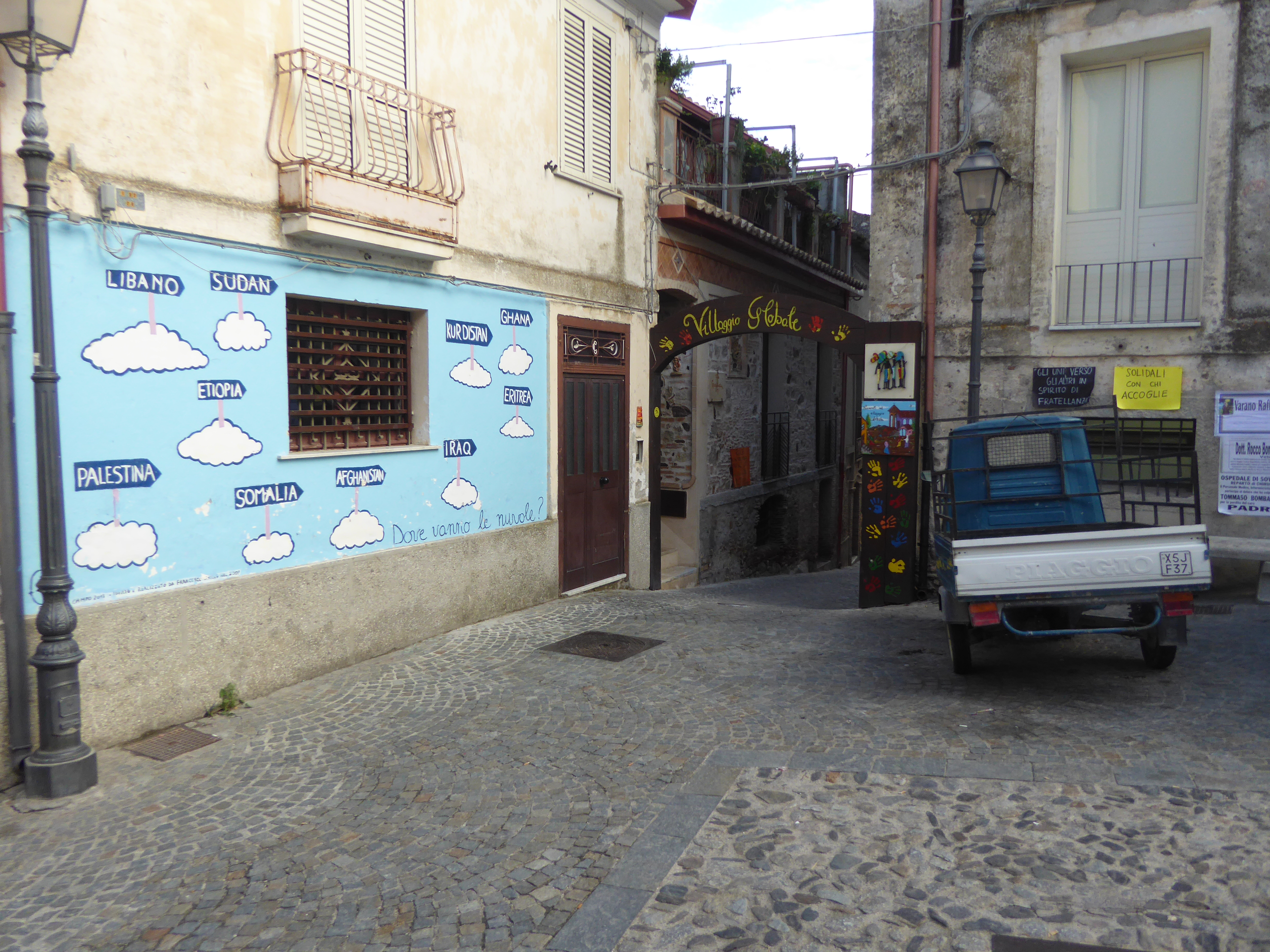 Ingresso Villaggio Globale a Riace (agosto 2018)